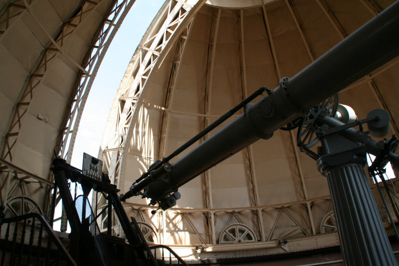 La lunette de l'observatoire de Strasbourg